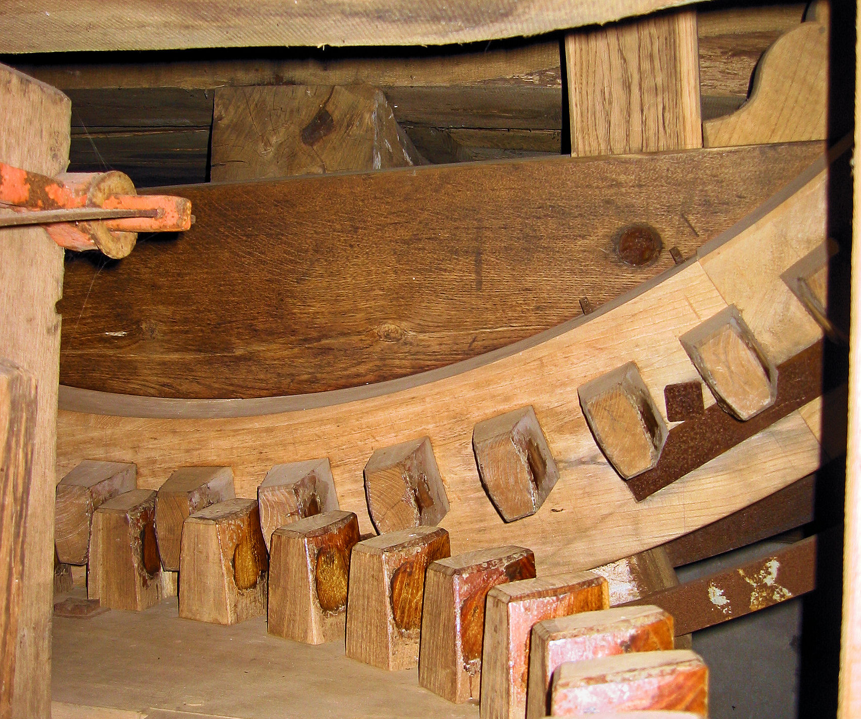 De Engel, bonkelaar met bovenwiel, Varsseveld, Gelderland, the Netherlands